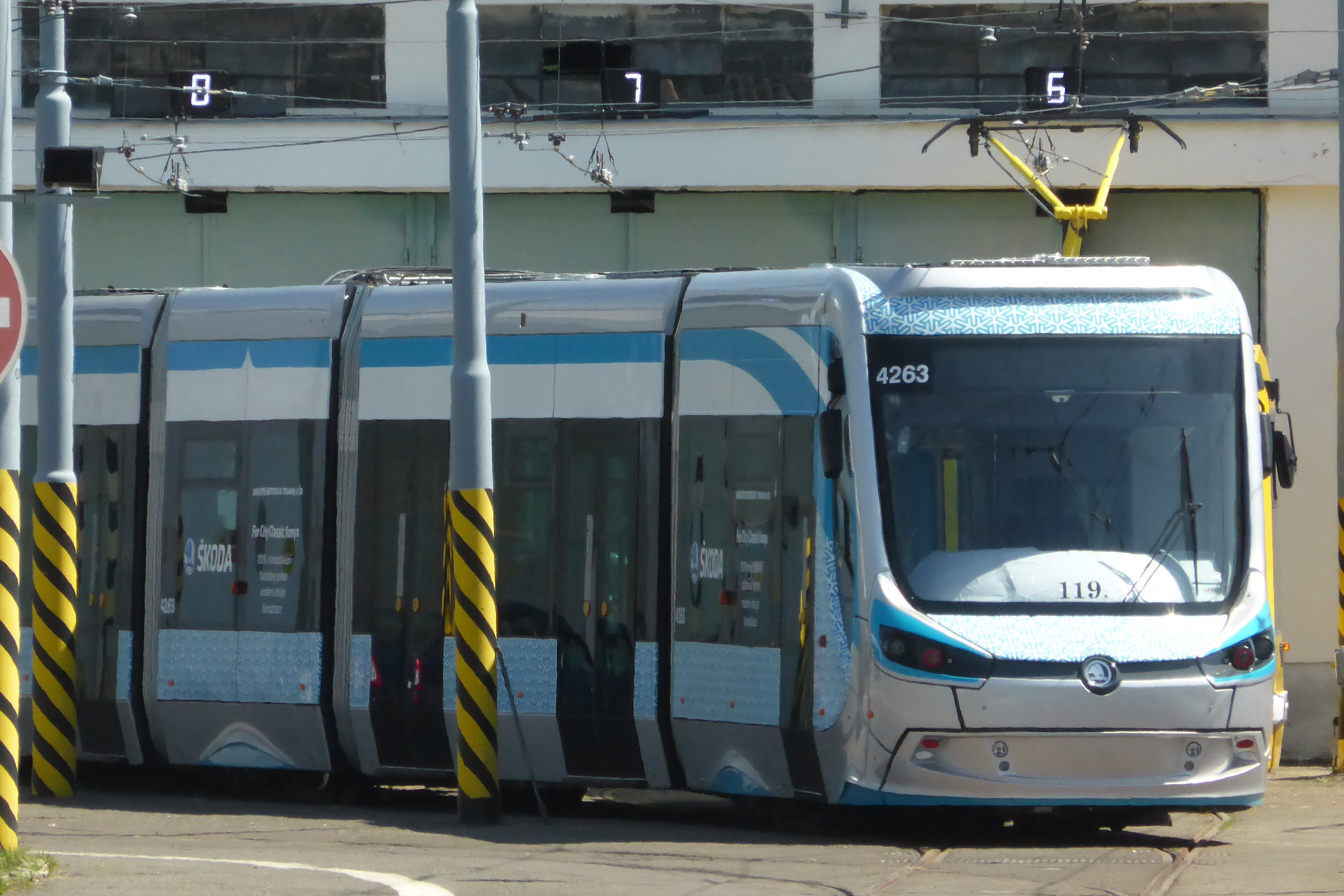 Tramvaj č. 119 vyráběná pro turecké město Konya, ve vozovně Slovany v Plzní.